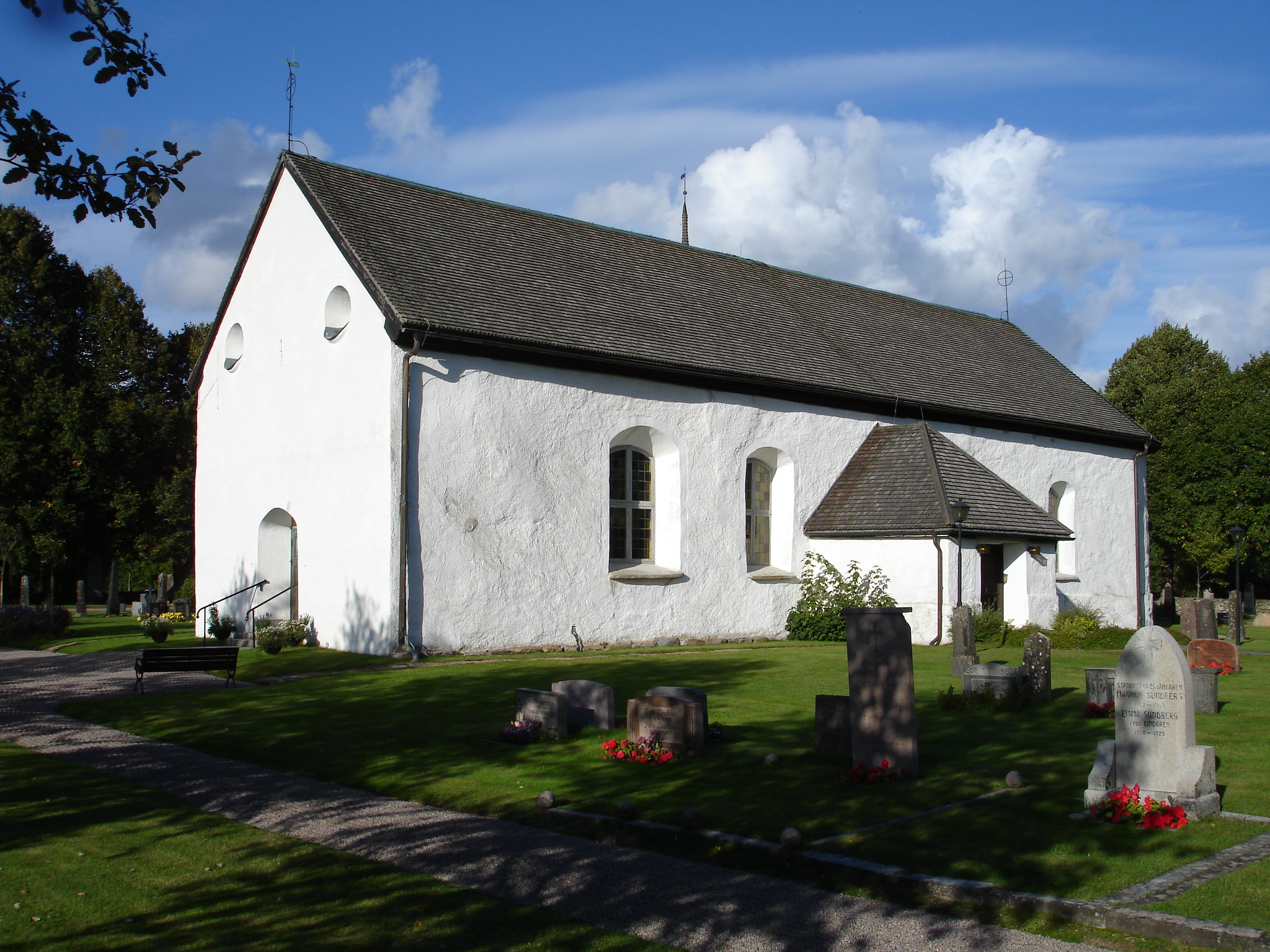 Angelstads kyrka en septemberdag 2011